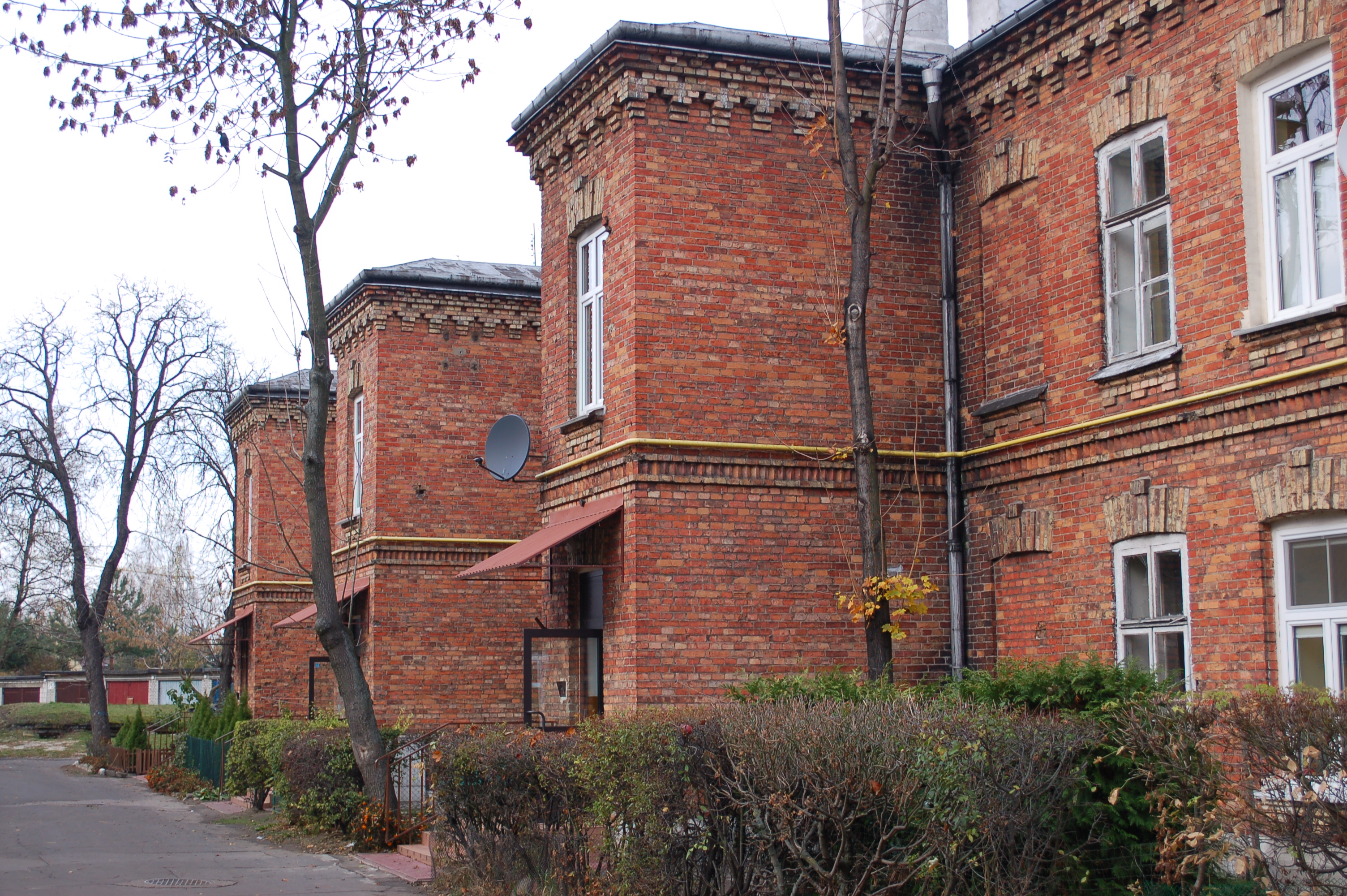 Zagrze barracks